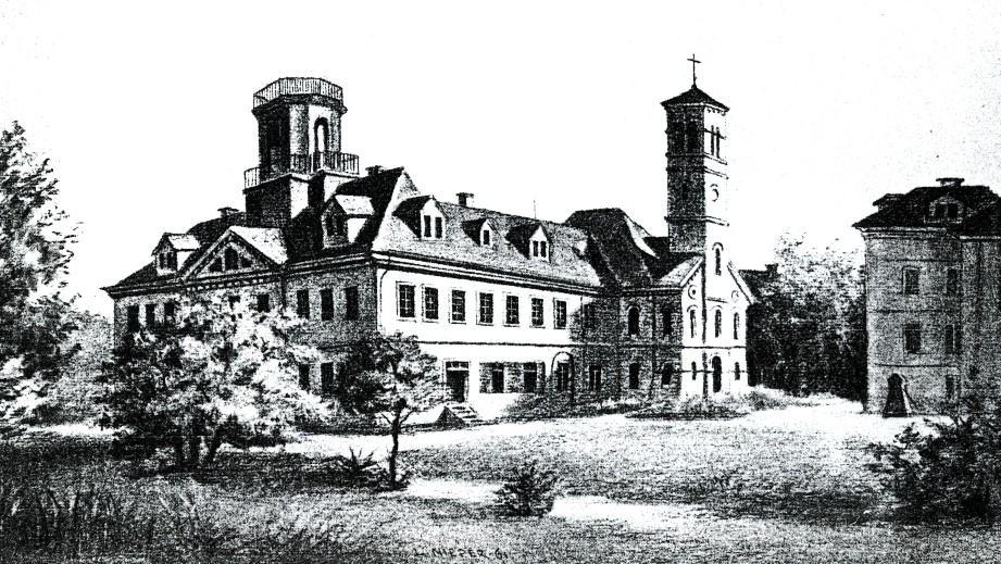 Der neue Bau der Diakonissenanstalt im Jahr 1863.